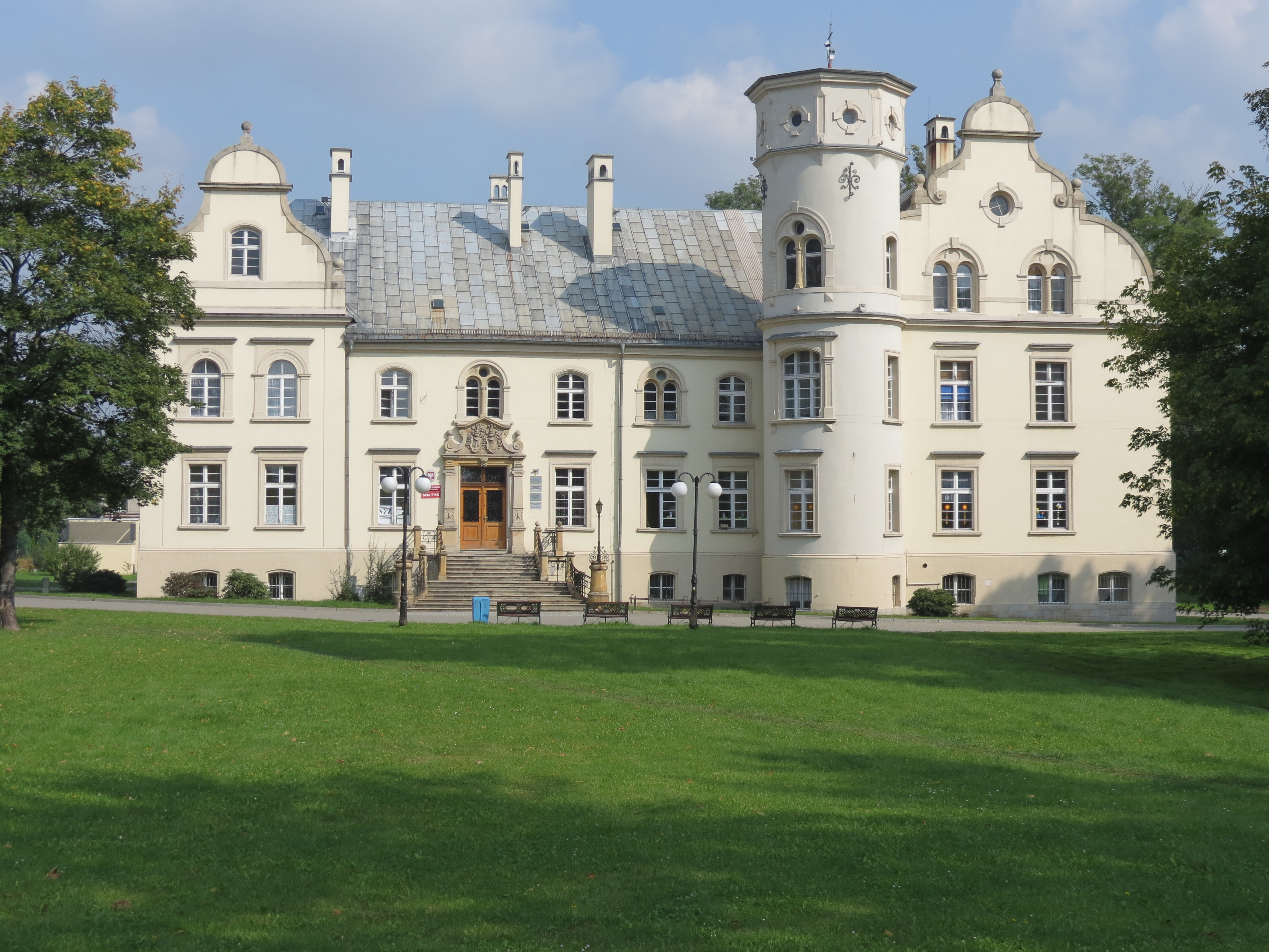 Przyszowice, ul. Gierałtowicka - park krajobrazowy i dwór, z końca XIX w. (zabytek nr A/1284/81)